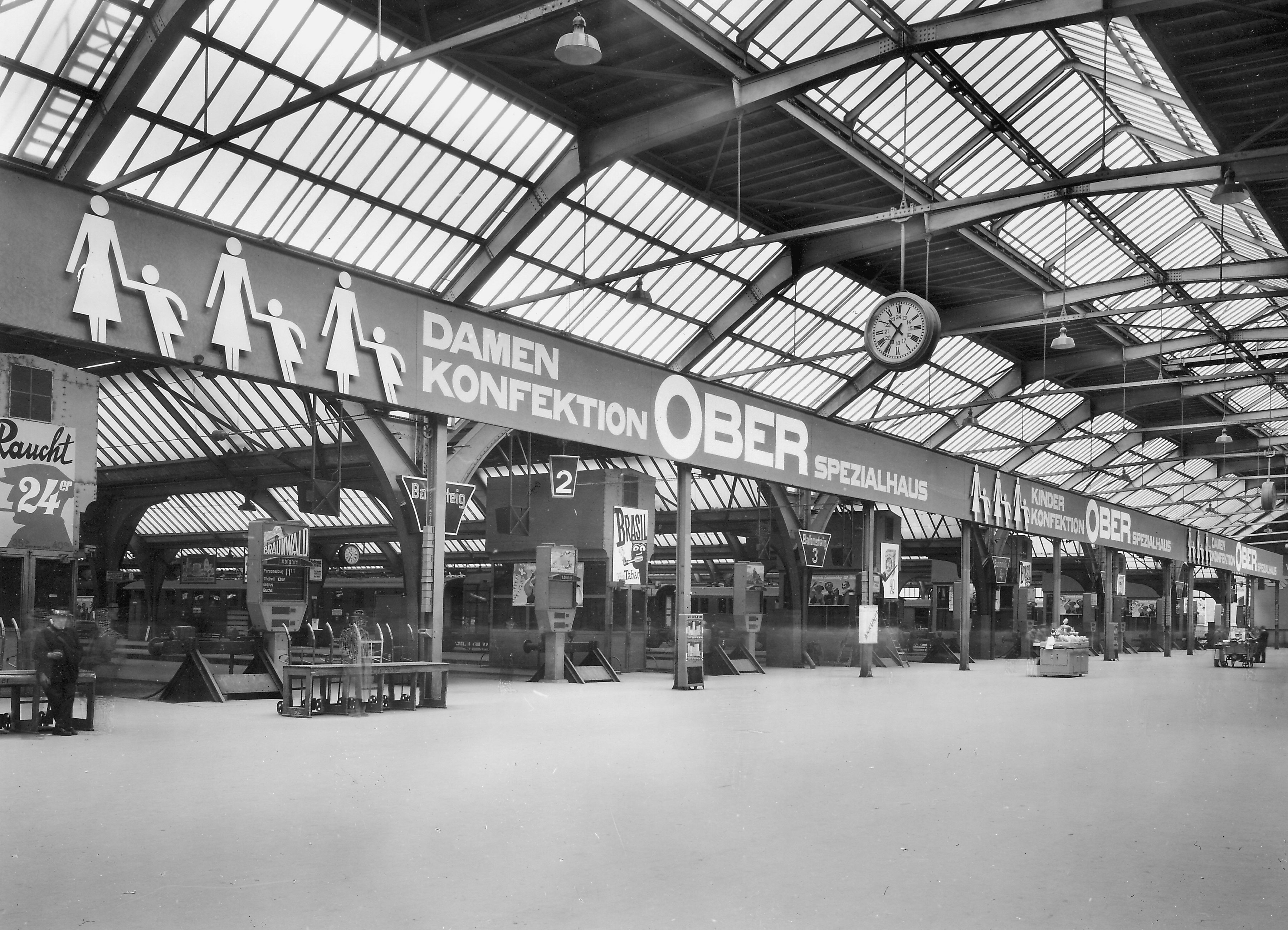 Zürich Hauptbahnhof, Quer- und Gleishalle im Jahr 1939